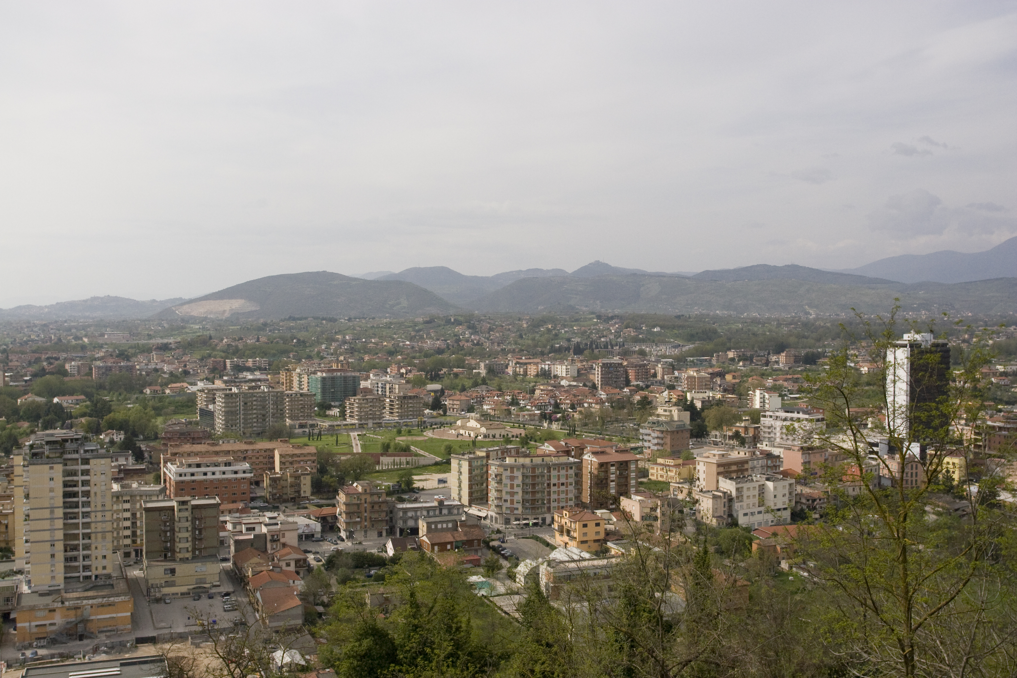 Panorama di Frosinone dal "Belvedere"